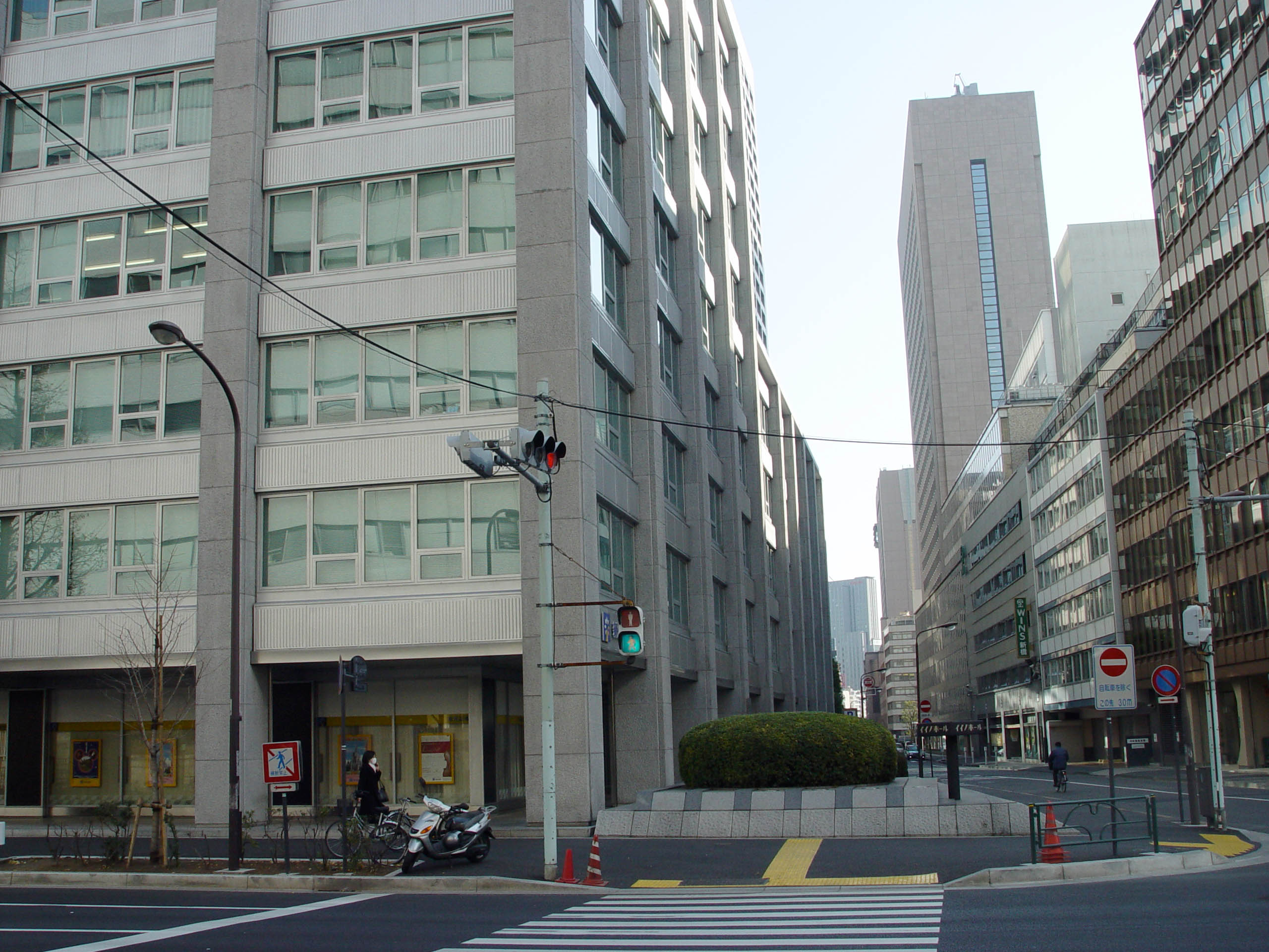 Iino Hall, Tokyo, Japan イイノホール